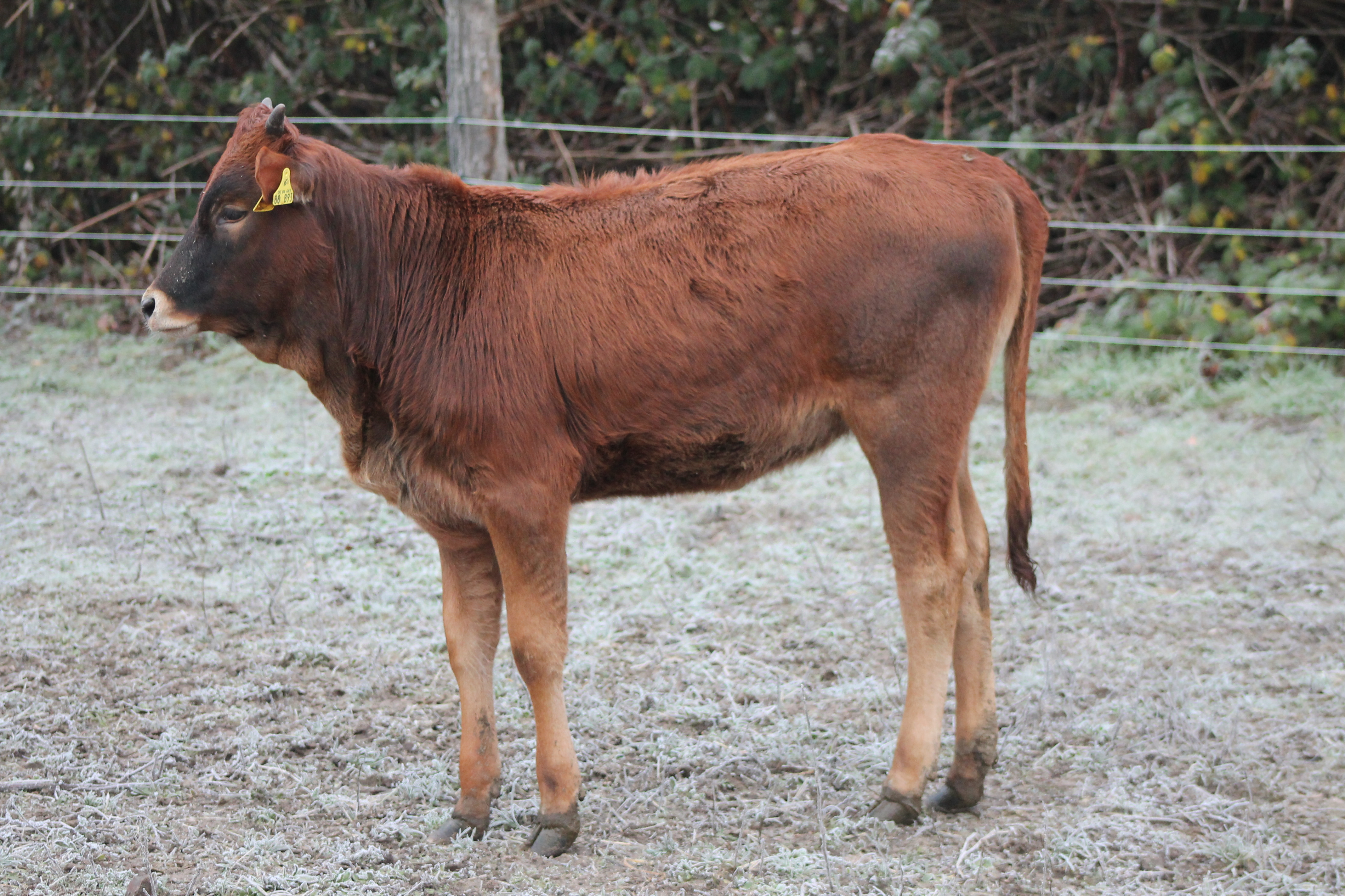 Kreuzungskalb der F1 Generation (Watussi x Maremmana)